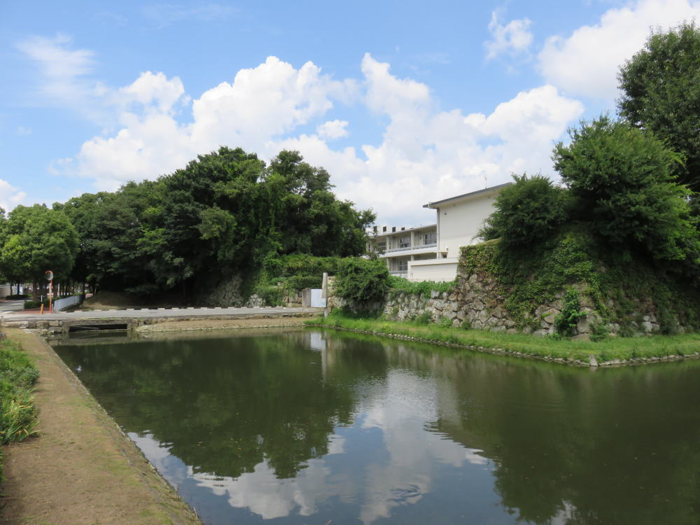 姫路城中曲輪、内京口門の石垣。